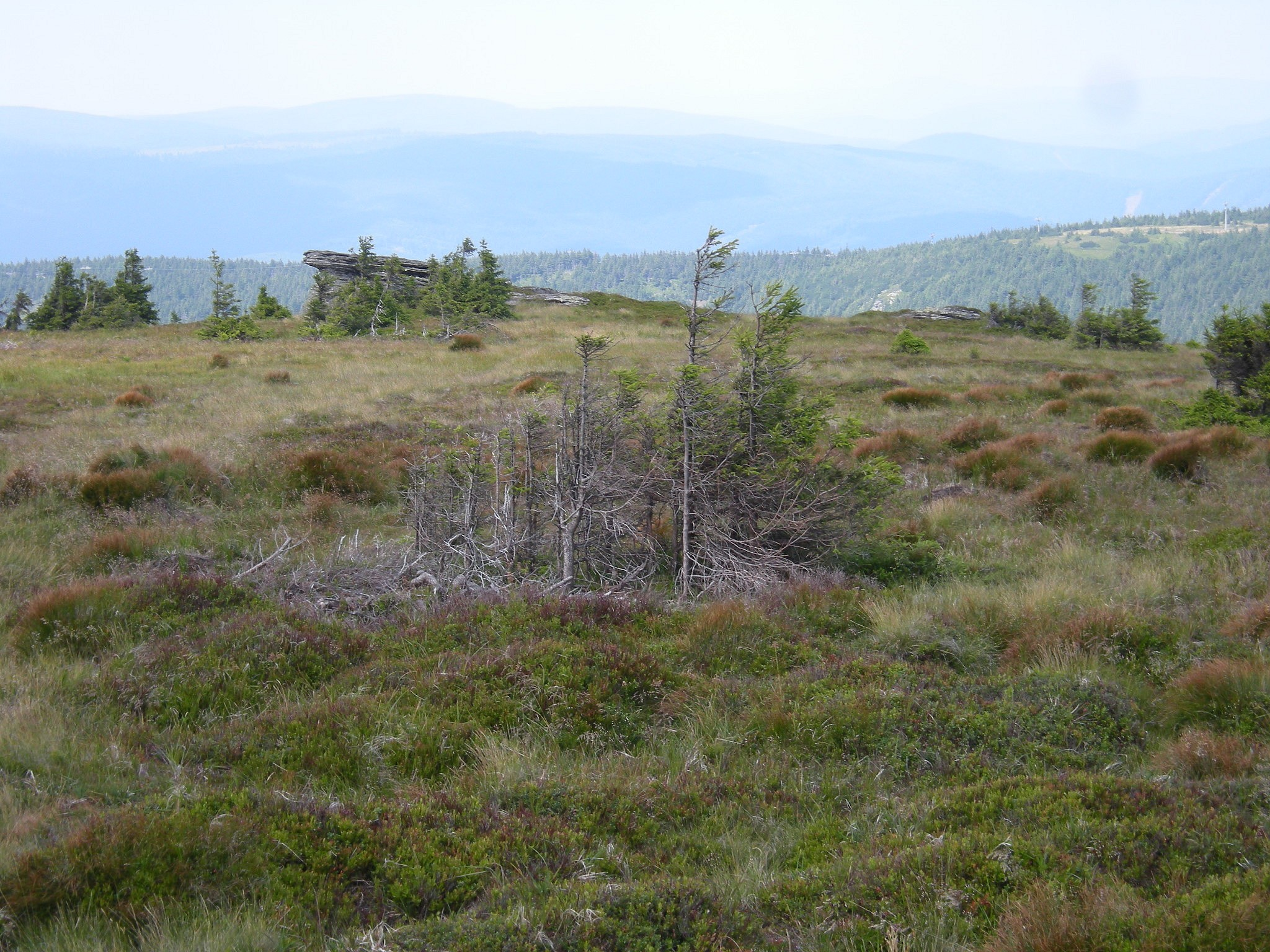 Roślinność na szczycie Keprnika